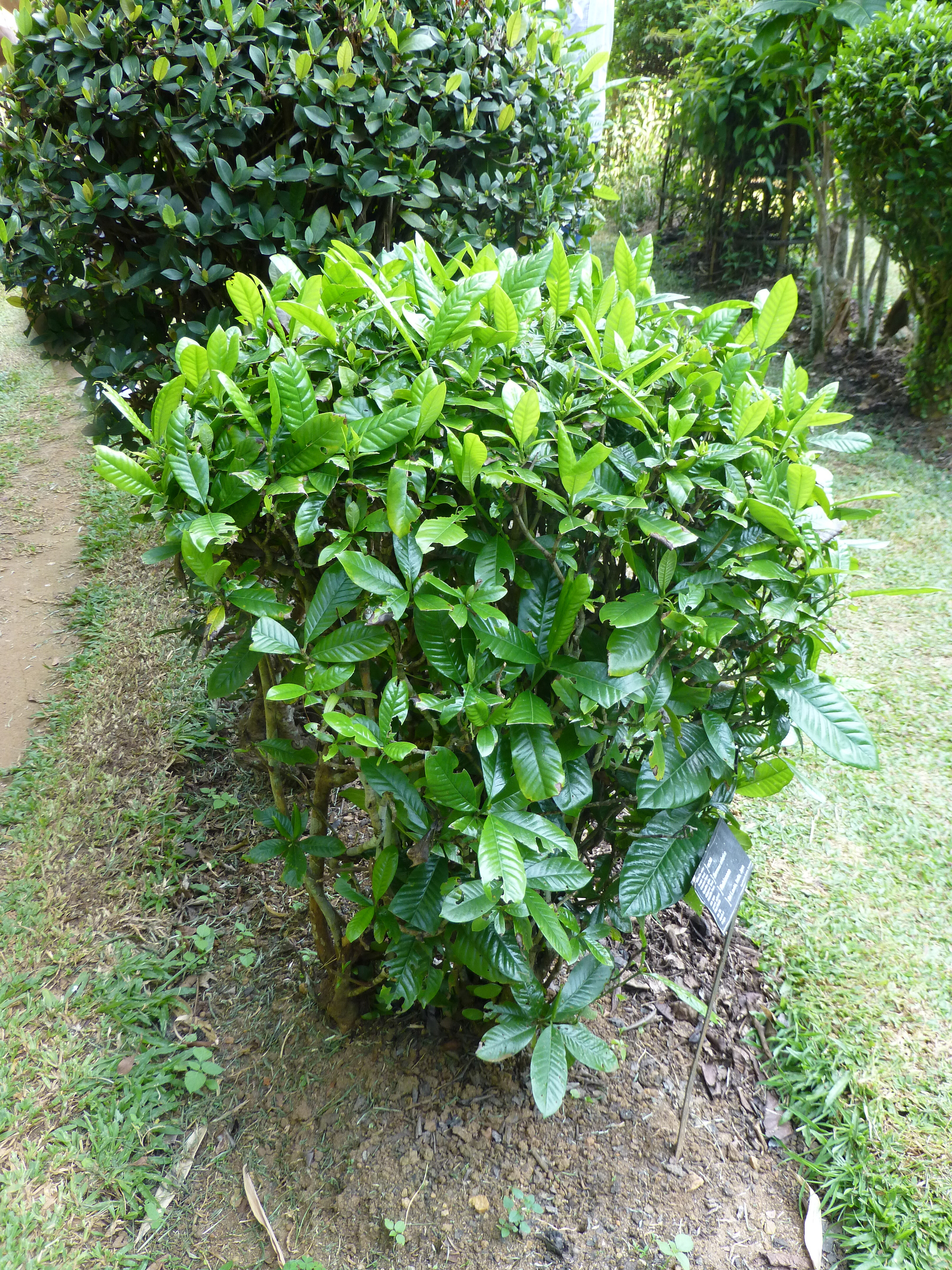 Tarenna asiatica au Jardin botanique de Kandy (Sri Lanka). Origine: Sri Lanka, Inde, Java.